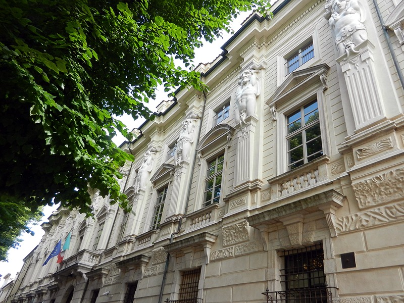 Mantova - Palazzo di Giustizia